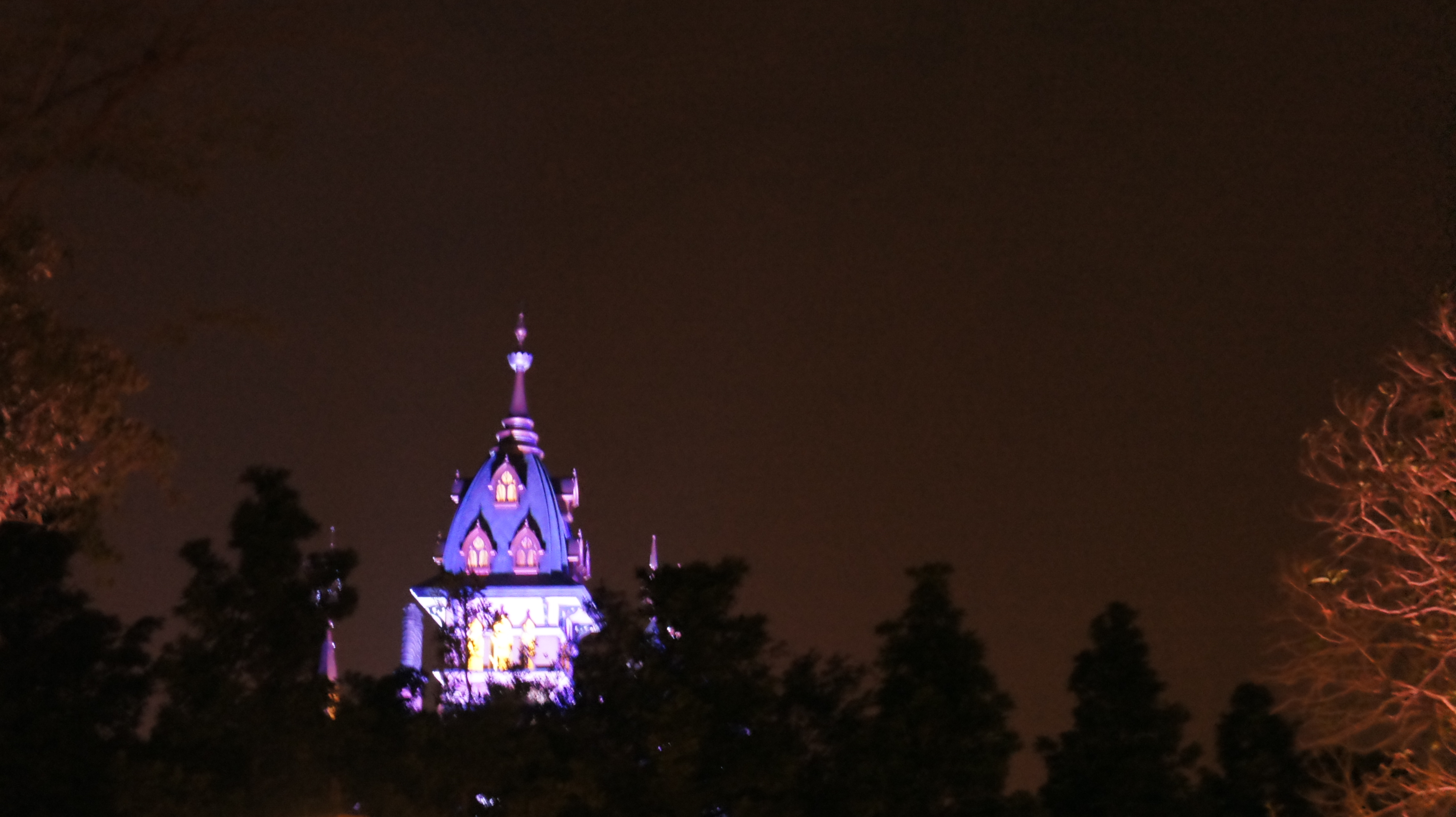 中文（香港）: 迷離大宅正進行燈光測試。